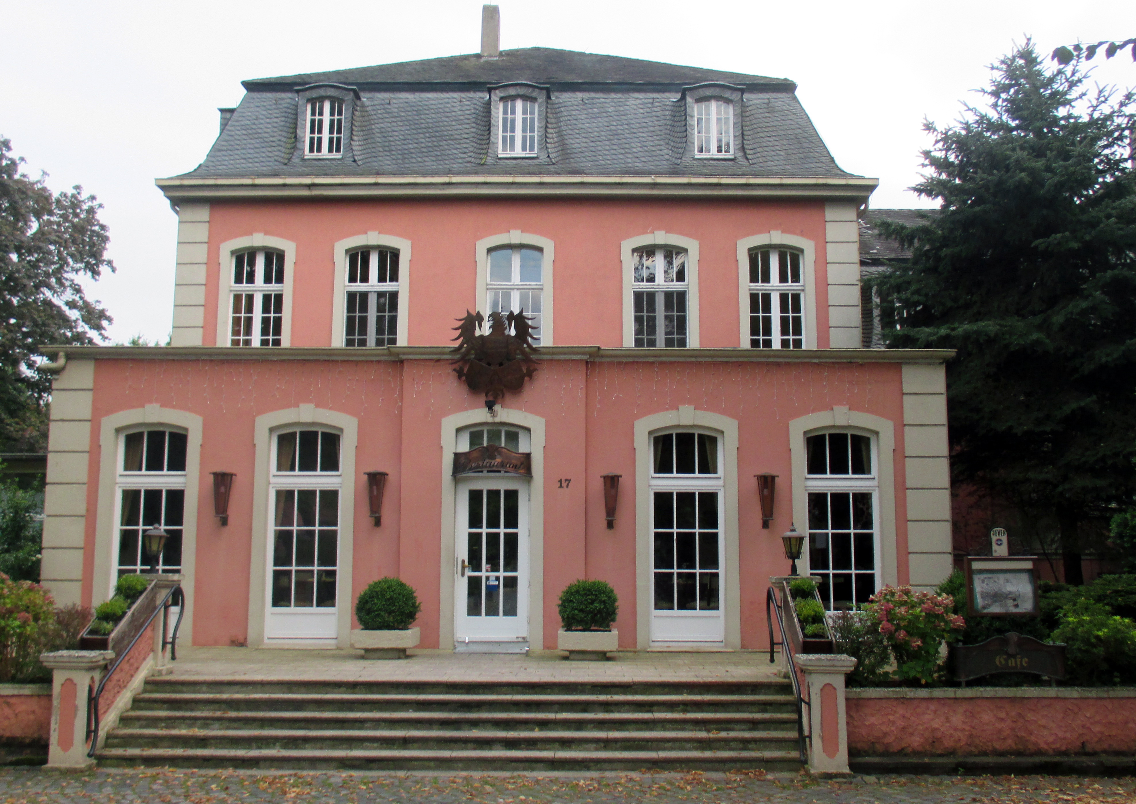 Landesstallmeisterhaus Schloss Wickrath